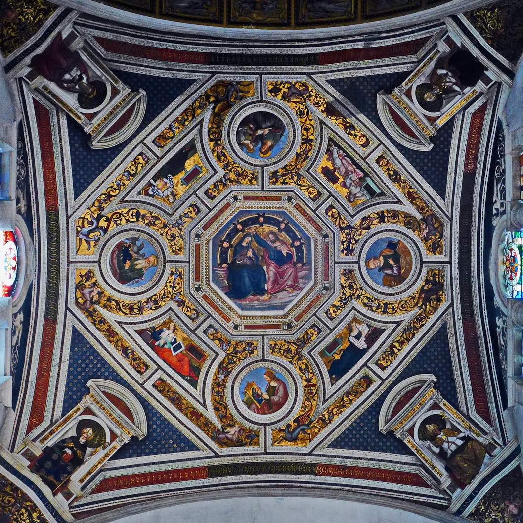 Rom - Basilika Santa Maria del Popolo